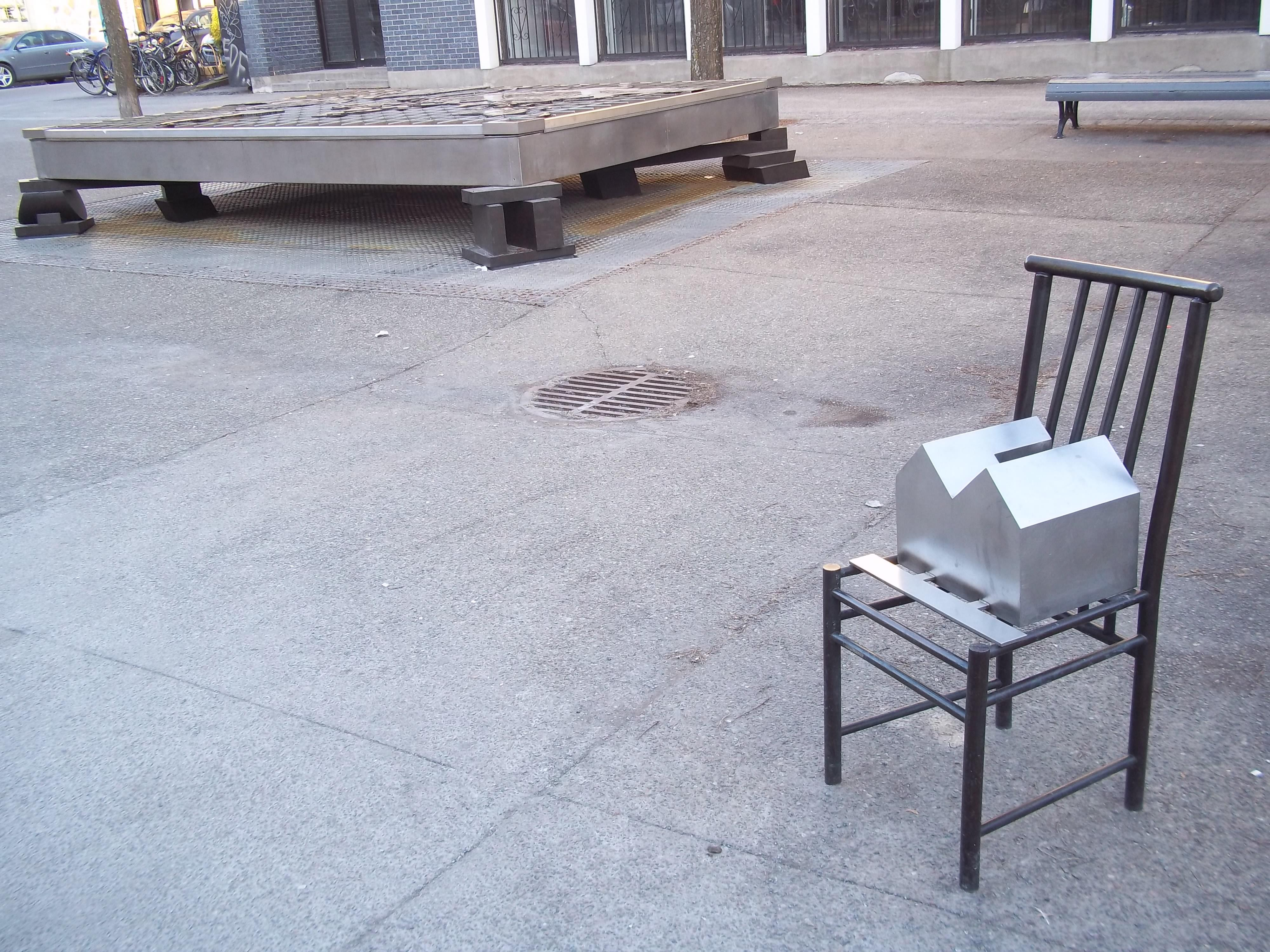 Les Leçons particulières, du sculpteur Michel Goulet, est le nom de deux sculptures-installations situées à Montréal. Le volet 1, de 1990, est à la place Roy. Le volet 2, de 1991, est au parc La Fontaine, au belvédère Léo-Ayotte.